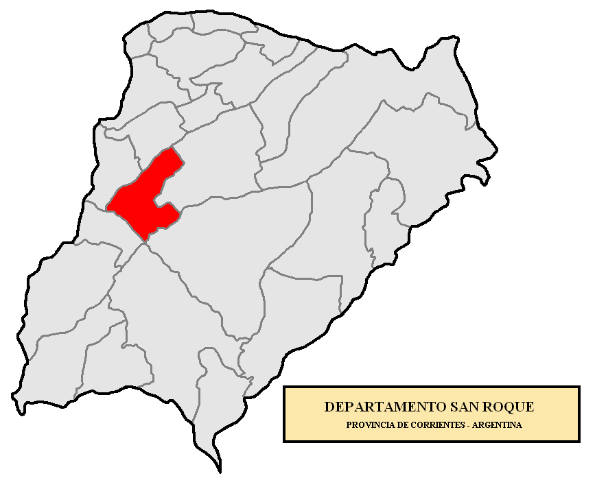 Ubicación de San Roque. Localización del Departamento San Roque, en la provincia de Corrientes, Argentina.